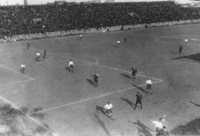 Nacional contra FC Barcelona (2:2) en la Gira de 1925